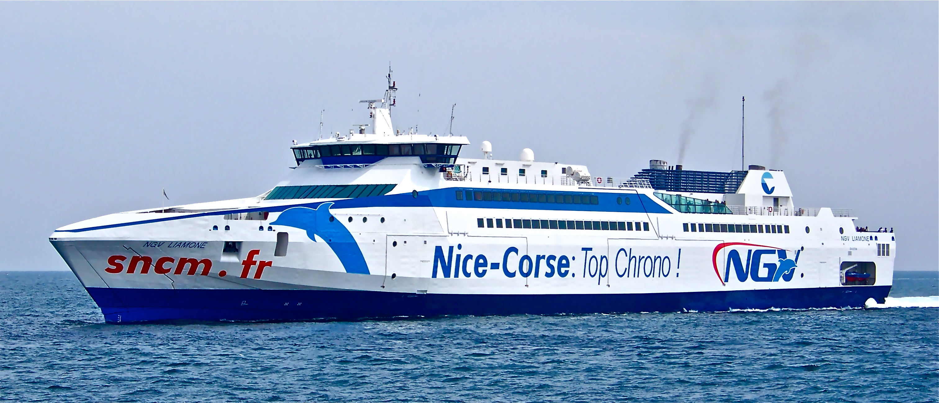 NGV Liamone, ancien navire de la SNCM.